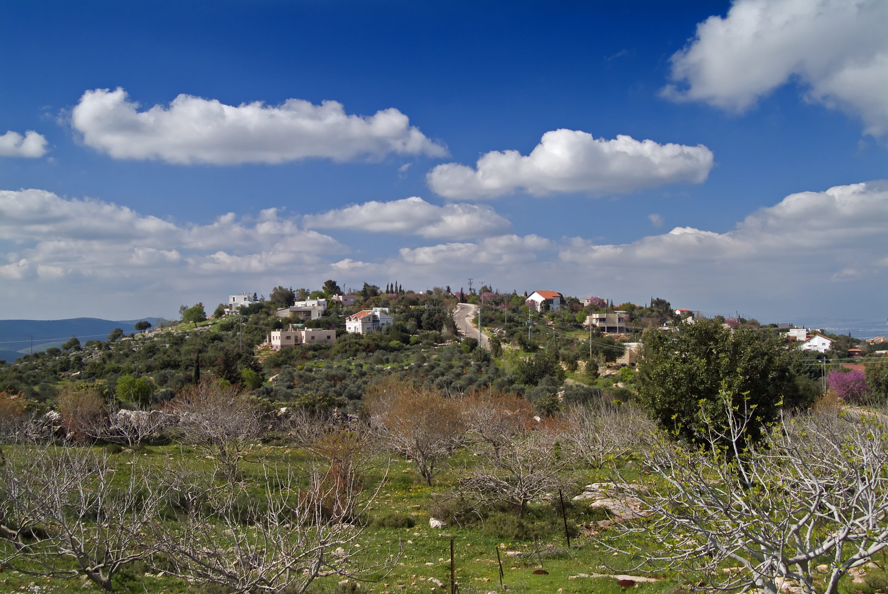 היישוב הקהילתי מכמנים על הר כמון